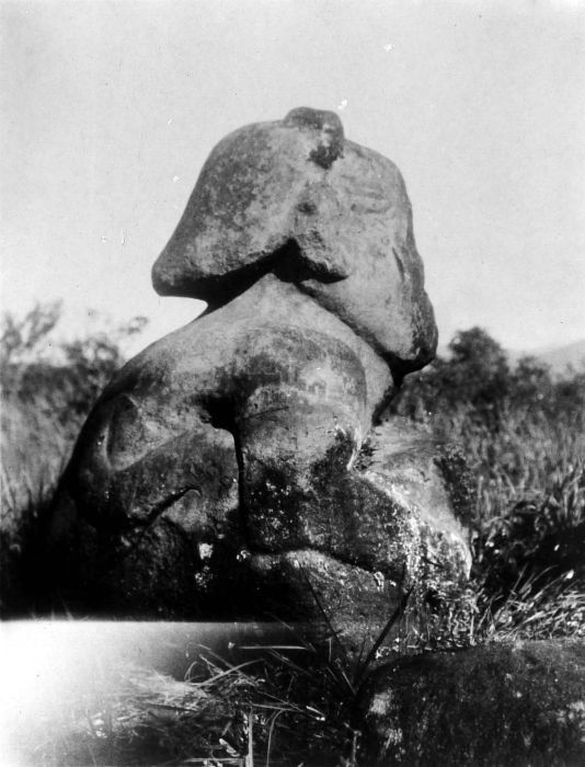 Repronegatief. Grof stenen beeld te Tinggi Hari, omgeving Palembang